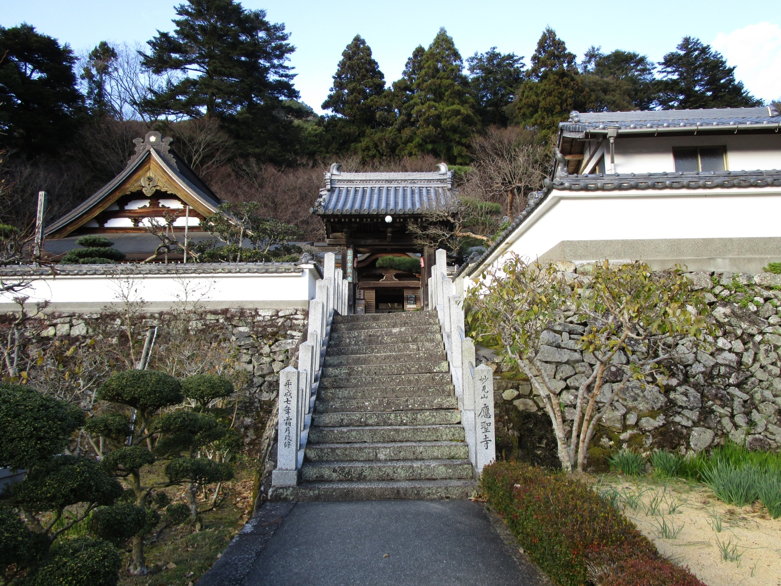 妙見山應聖寺 入り口